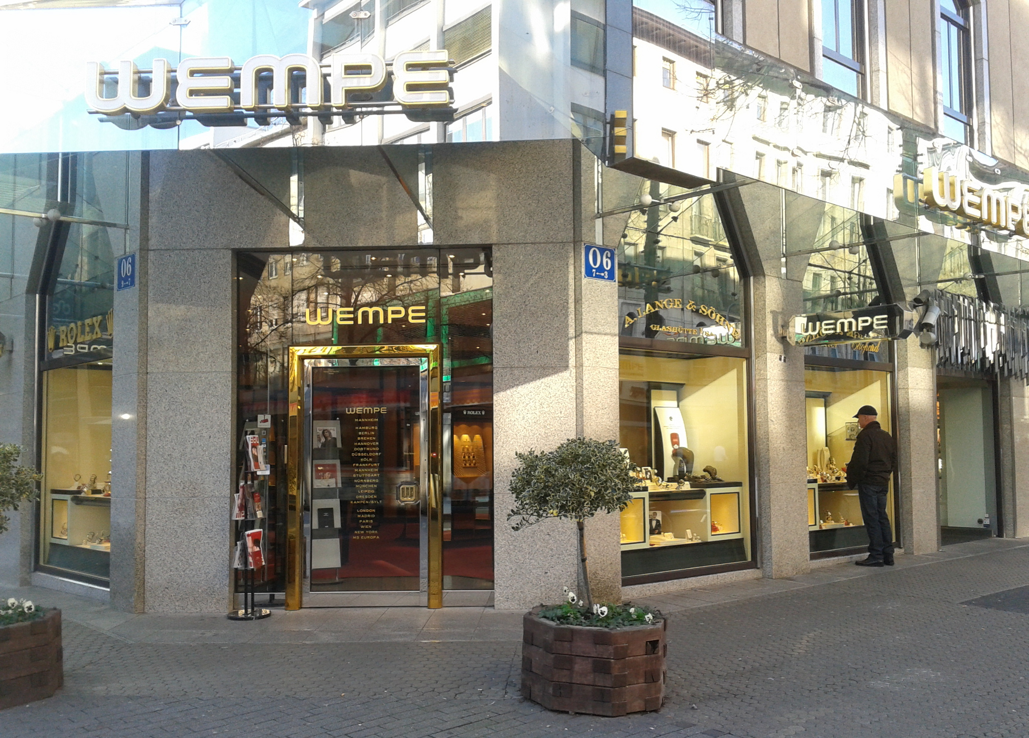 Wempe auf den Mannheimer Planken, O6